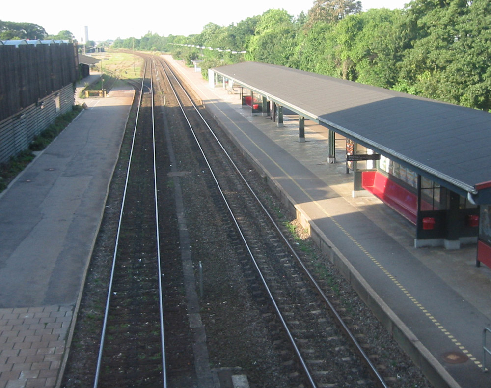 Bahnhof Vordingborg